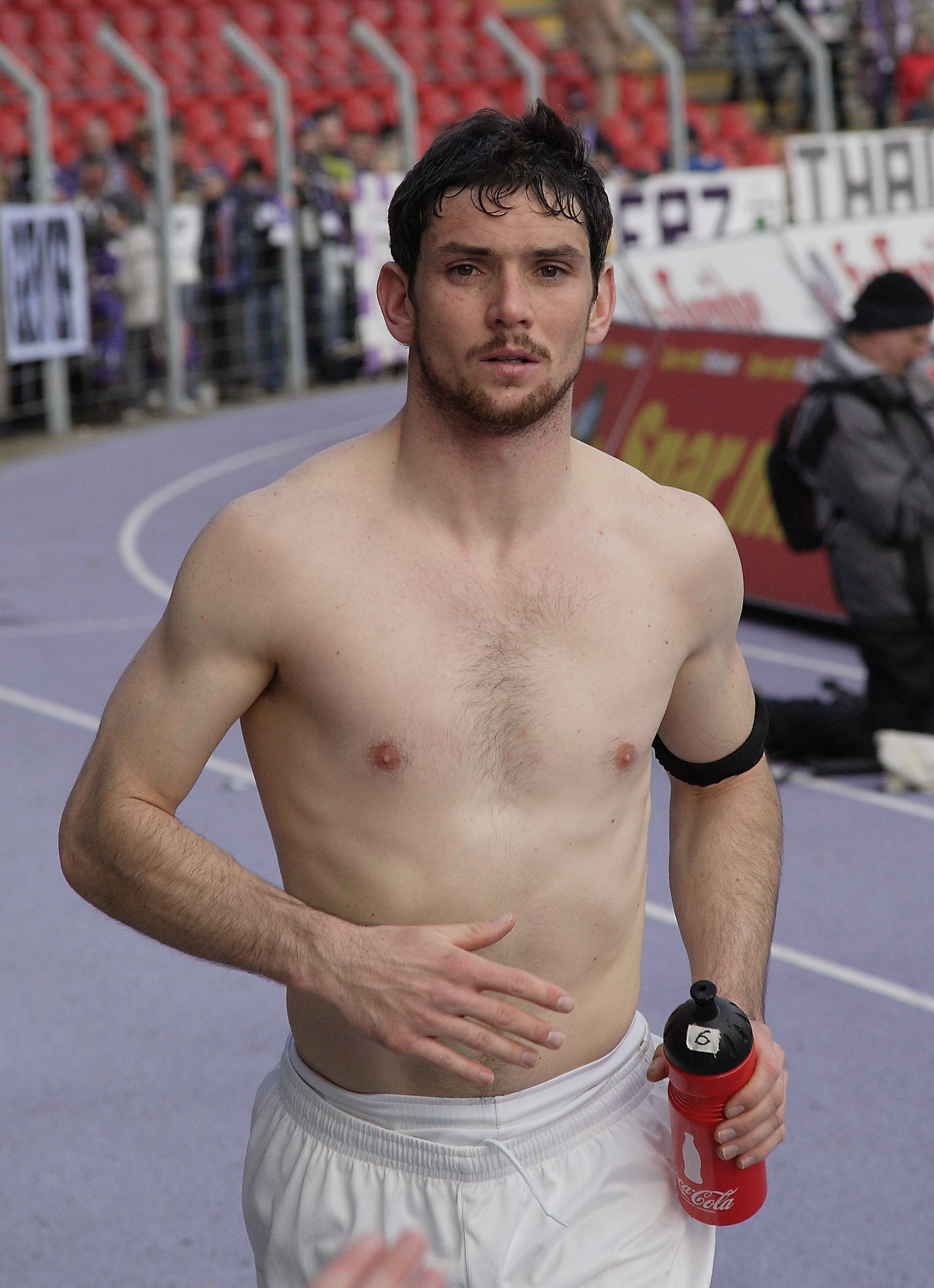 Kevin Schlitte